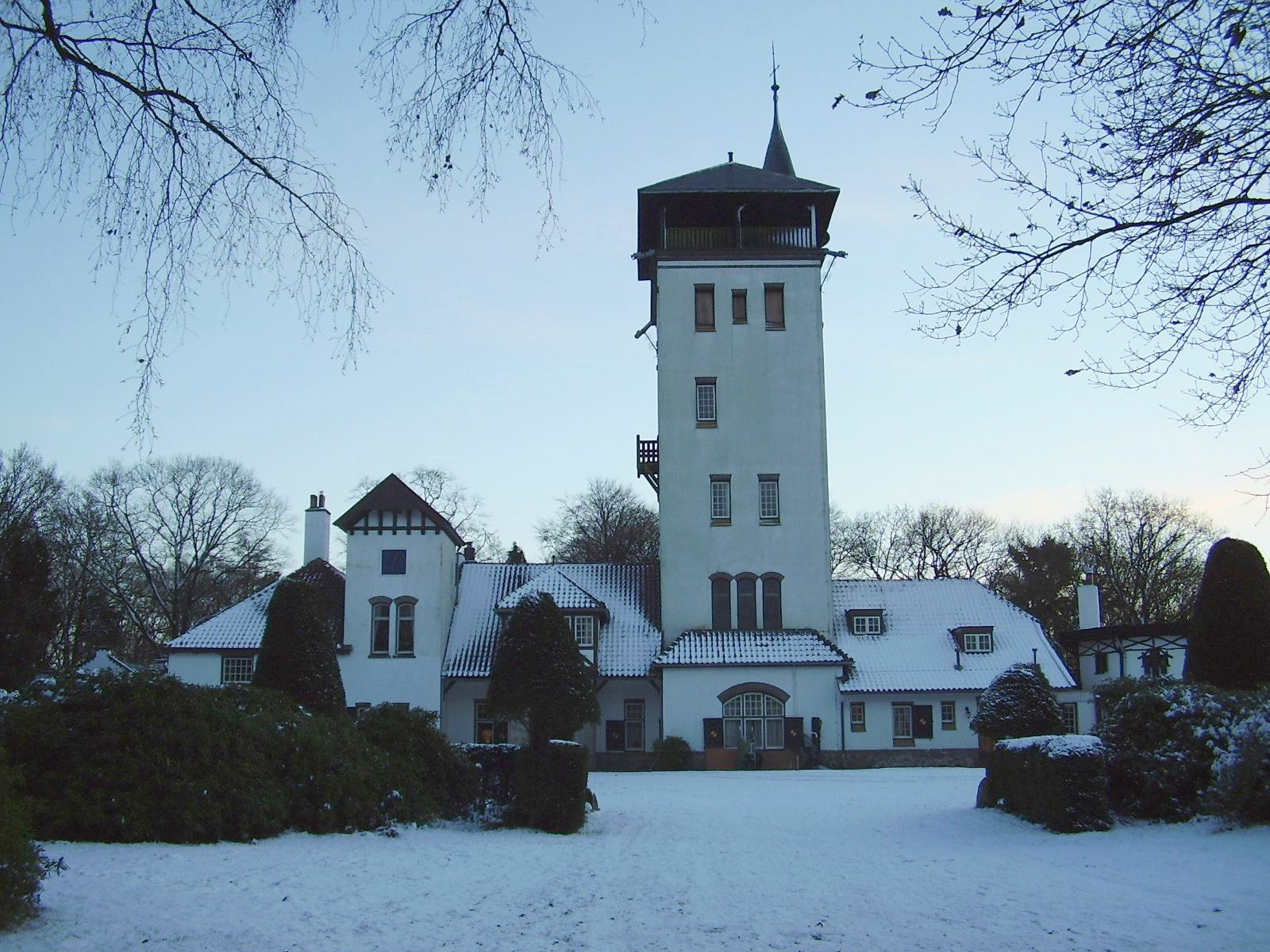 Sprengenberg in de Sneeuw 16-12-2005